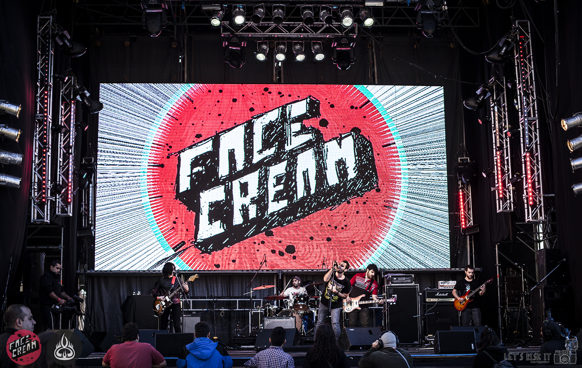 En vivo Ciudad Emergente 2014 por Nicolas Torregiani - Lets Risk It